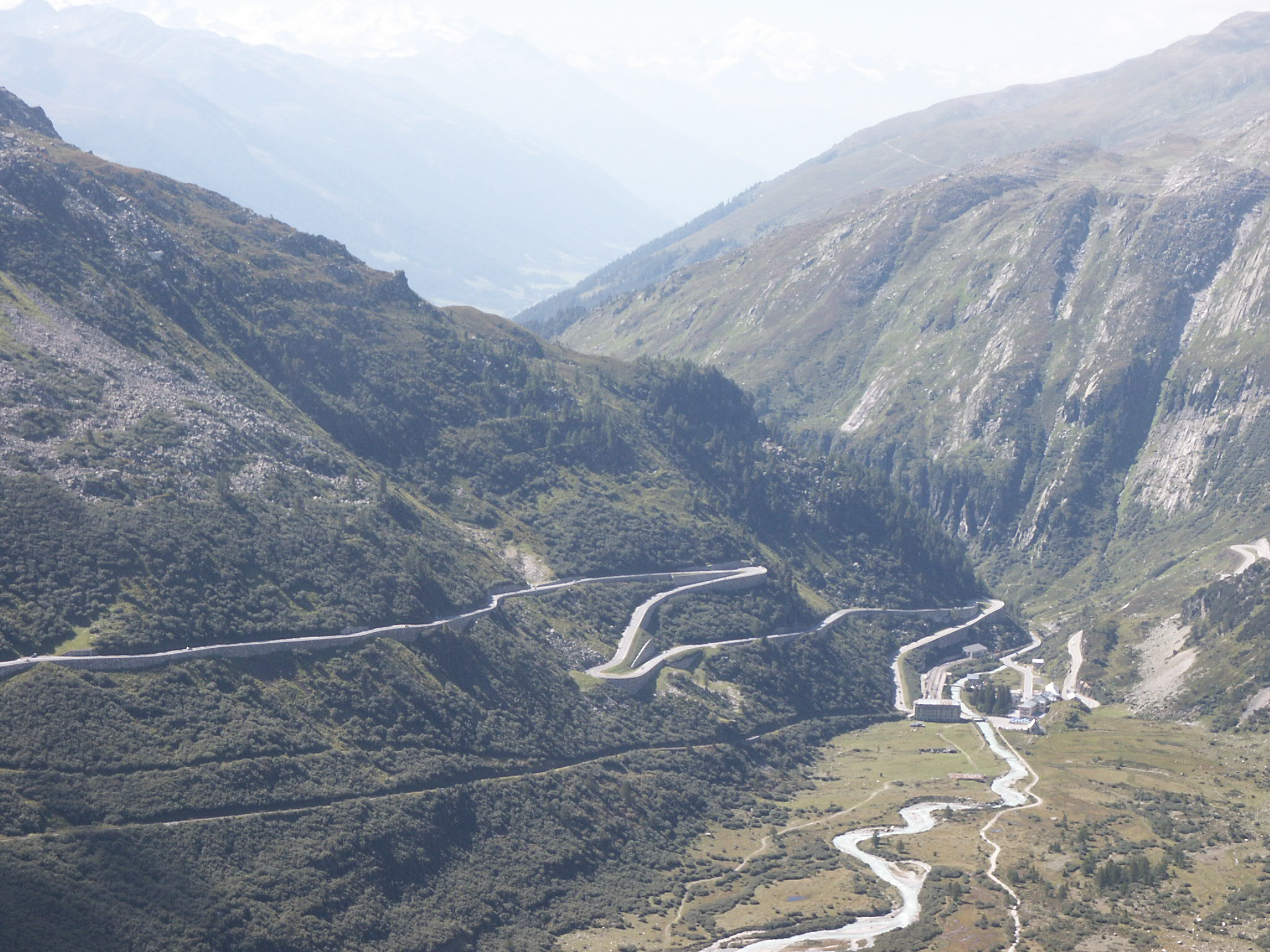 Switzerland, Furkapass, Furka high alpine pass